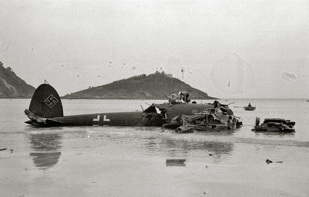 Título original: Aterrizaje en la playa de la Concha del bombardero modelo Heinkel 111, que venía directamente desde Noruega de Léon Degrelle, piloto belga y cabeza del partido nazi en Bélgica en la Segunda Guerra Mundial (3/5) Localización: San Sebastián (Guipúzcoa)